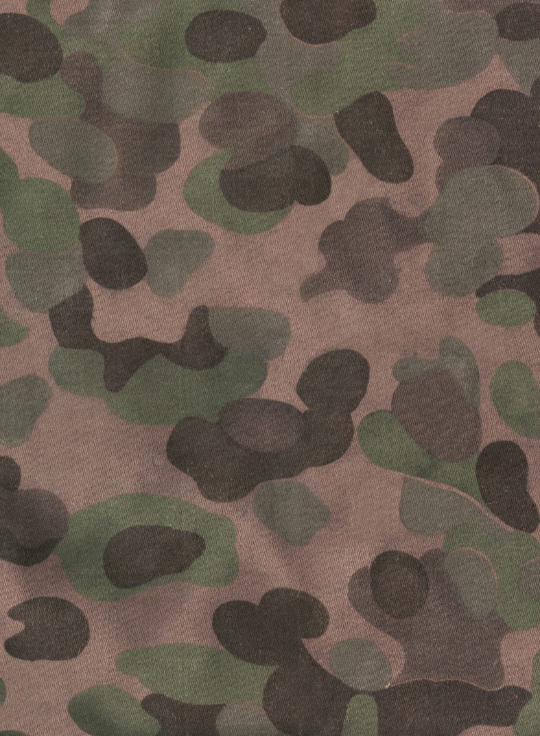 Historic Austrian Camouflage Cropped caption:Österreichisches ErbsentarnDieses Tarnmuster wurde von 1957 bis 1978im Österreichischen Bundesheer verwendet.